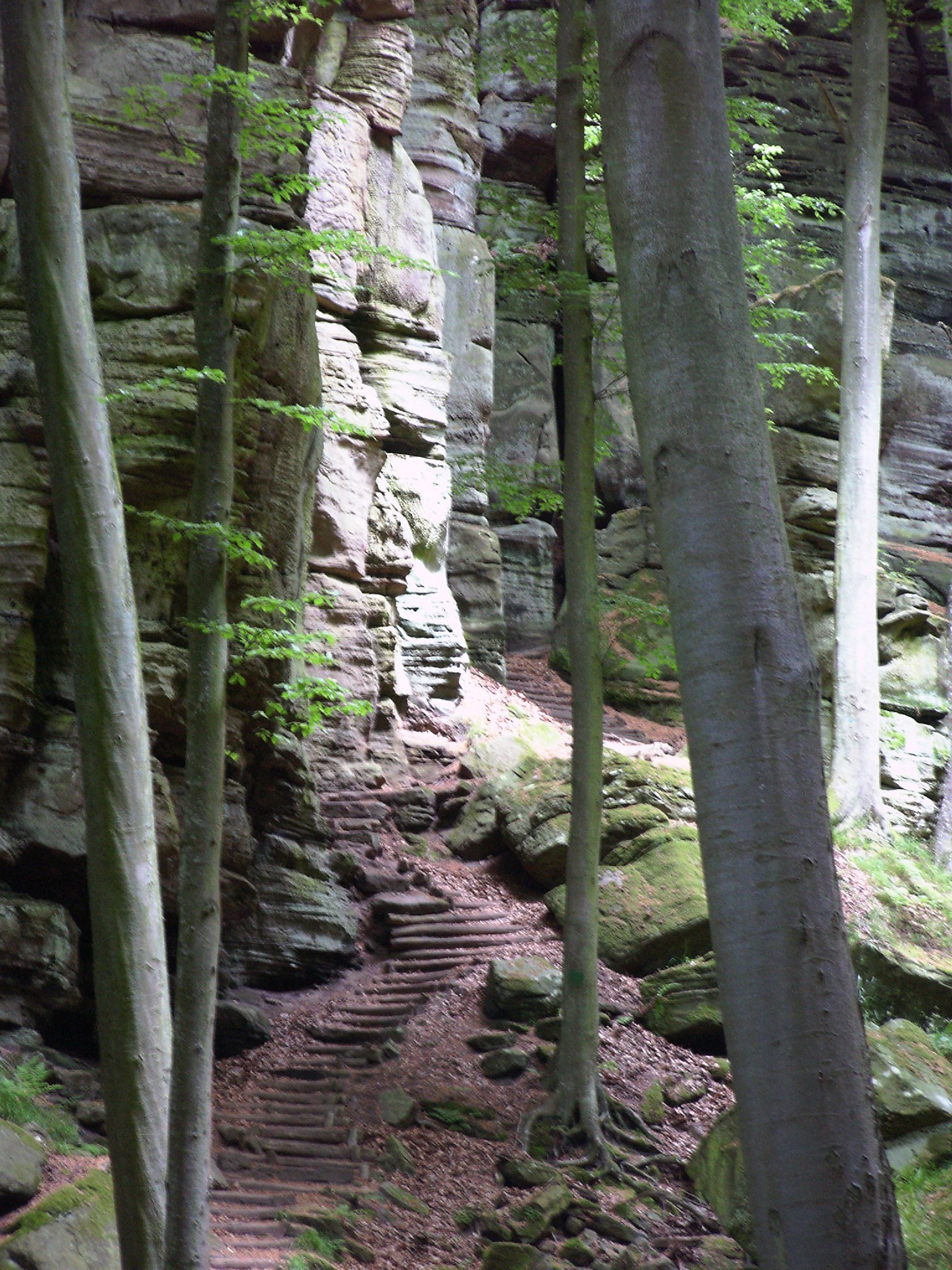 Im Wald bei Berdorf in Luxemburg